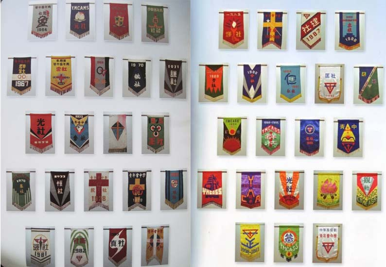 中文（香港）: 此是中華基督教青年會中學上環校舍年代的28個社旗, 由第一代何世明牧師定下來。